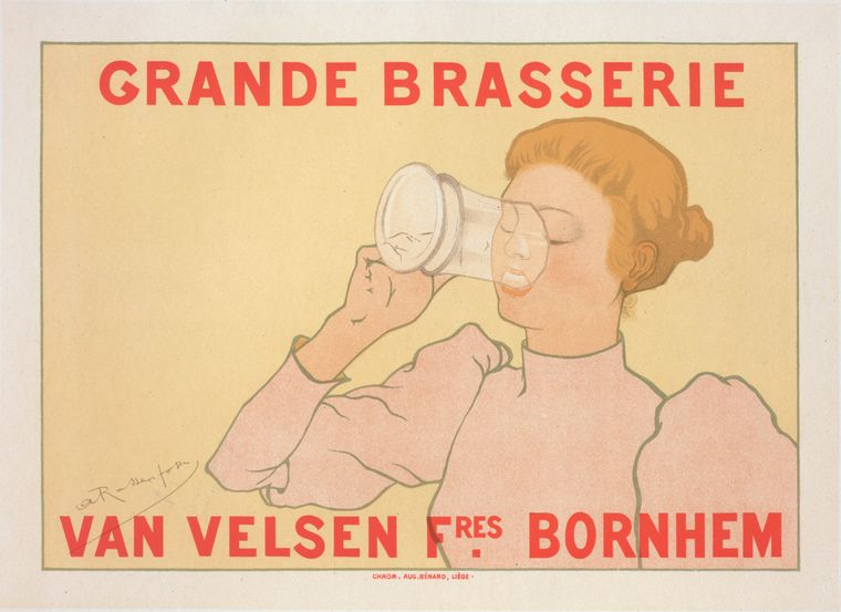 Affiche belge. Grande Brasserie Van Velsen frères. Bornhem.